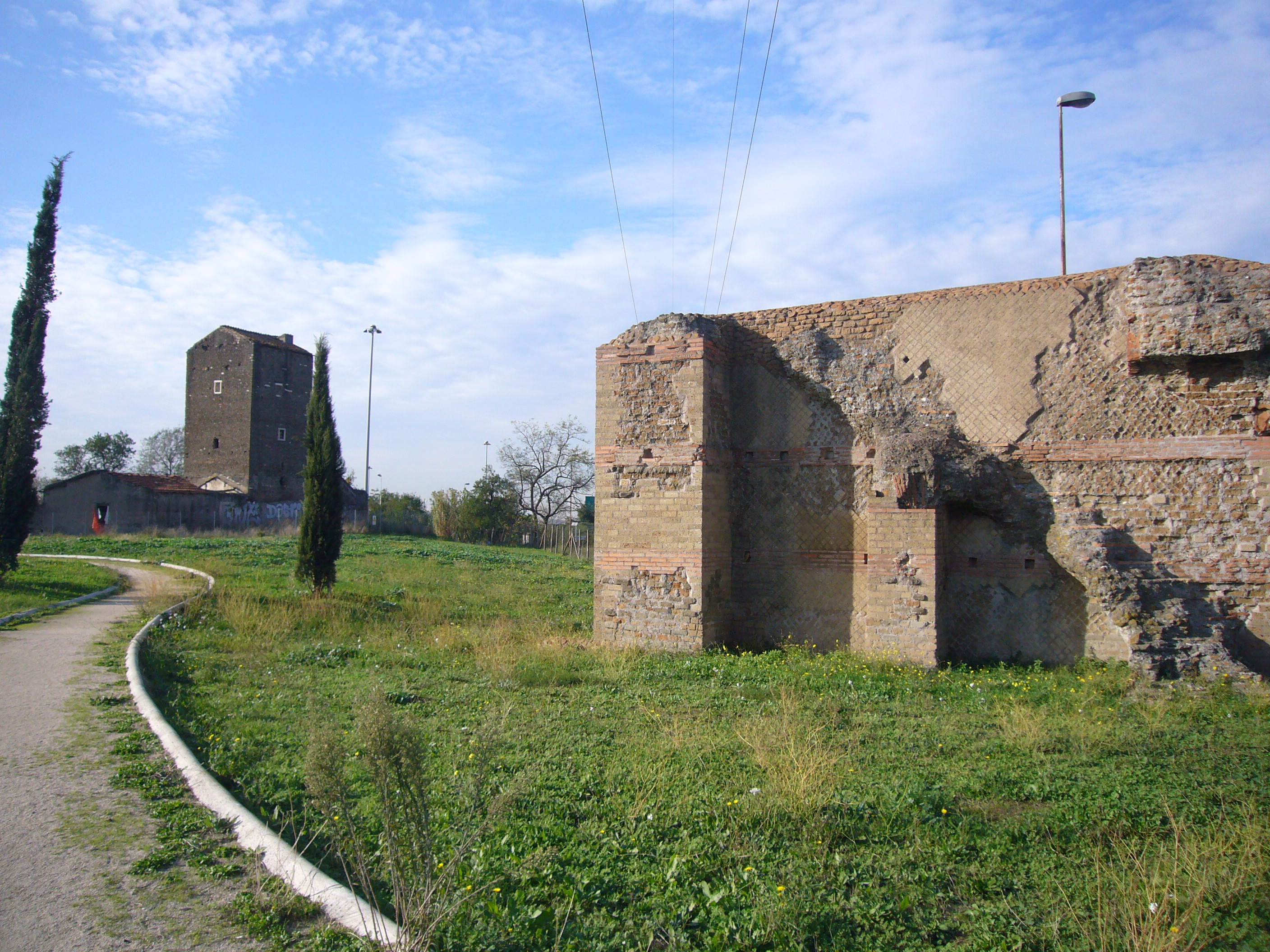 Roma, Municipio X, urbanizzazione Anagnina Torre di Mezza via - cisterna romana e la torre sullo sfondo